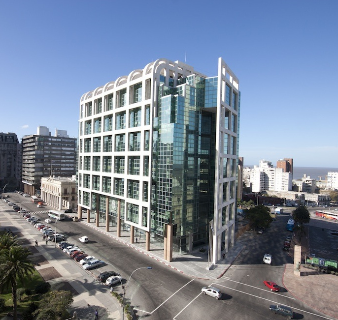 Torre Ejecutiva, Plaza independencia, Montevideo.